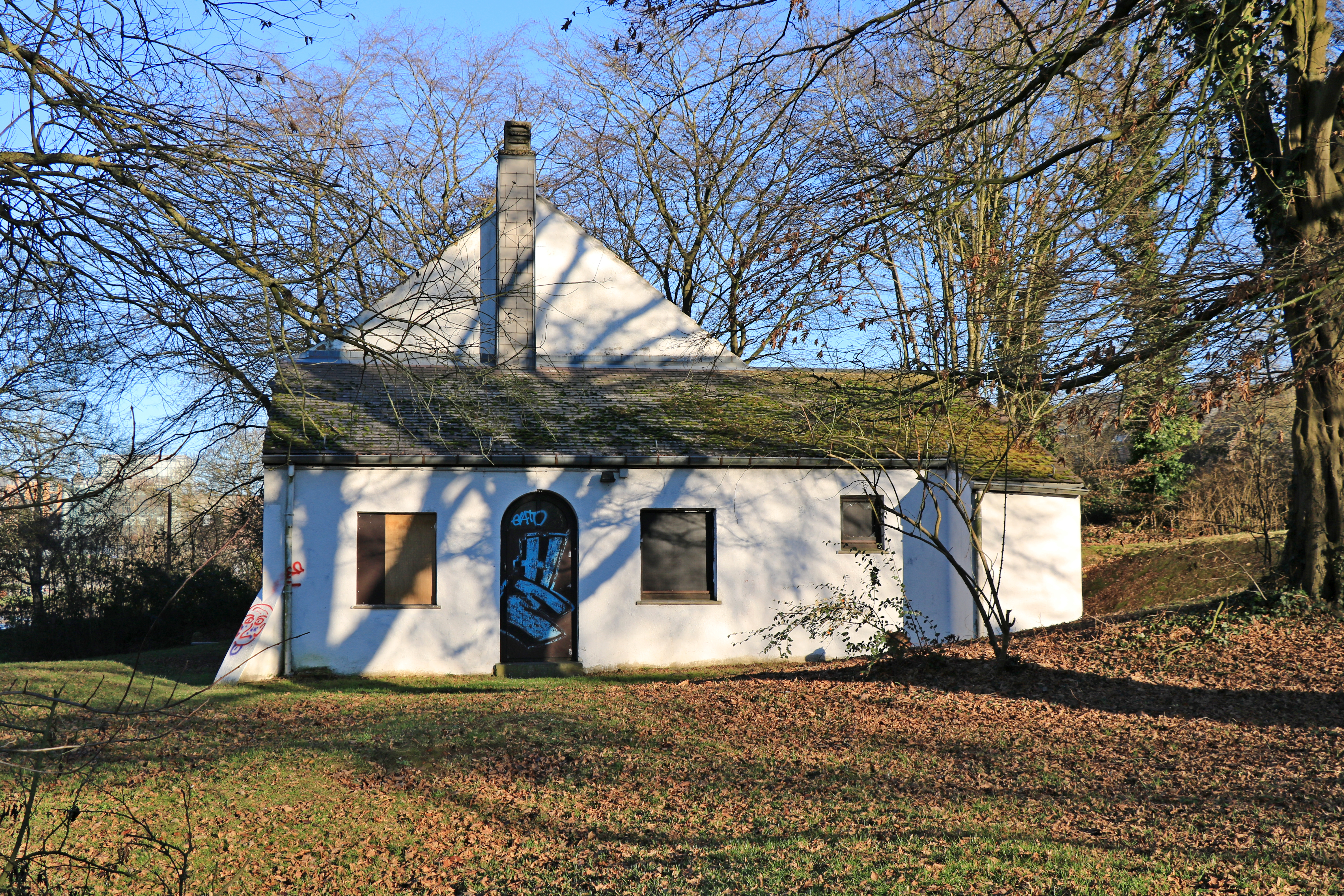 Belgique - Brabant wallon - Ottignies-Louvain-la-Neuve : la Maison Blanche ou petite Maison du Lac